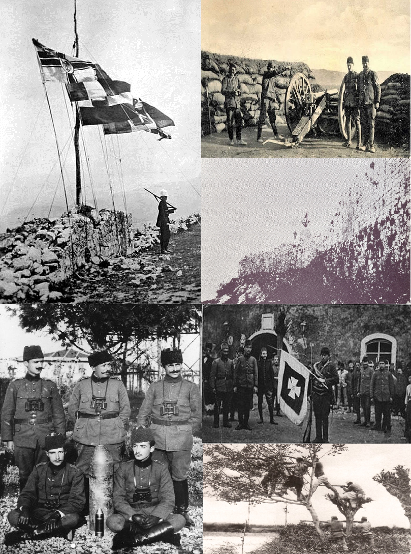 Lufta e Shkodrës